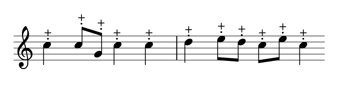 Hanbell mallets (bells on table) technique notation